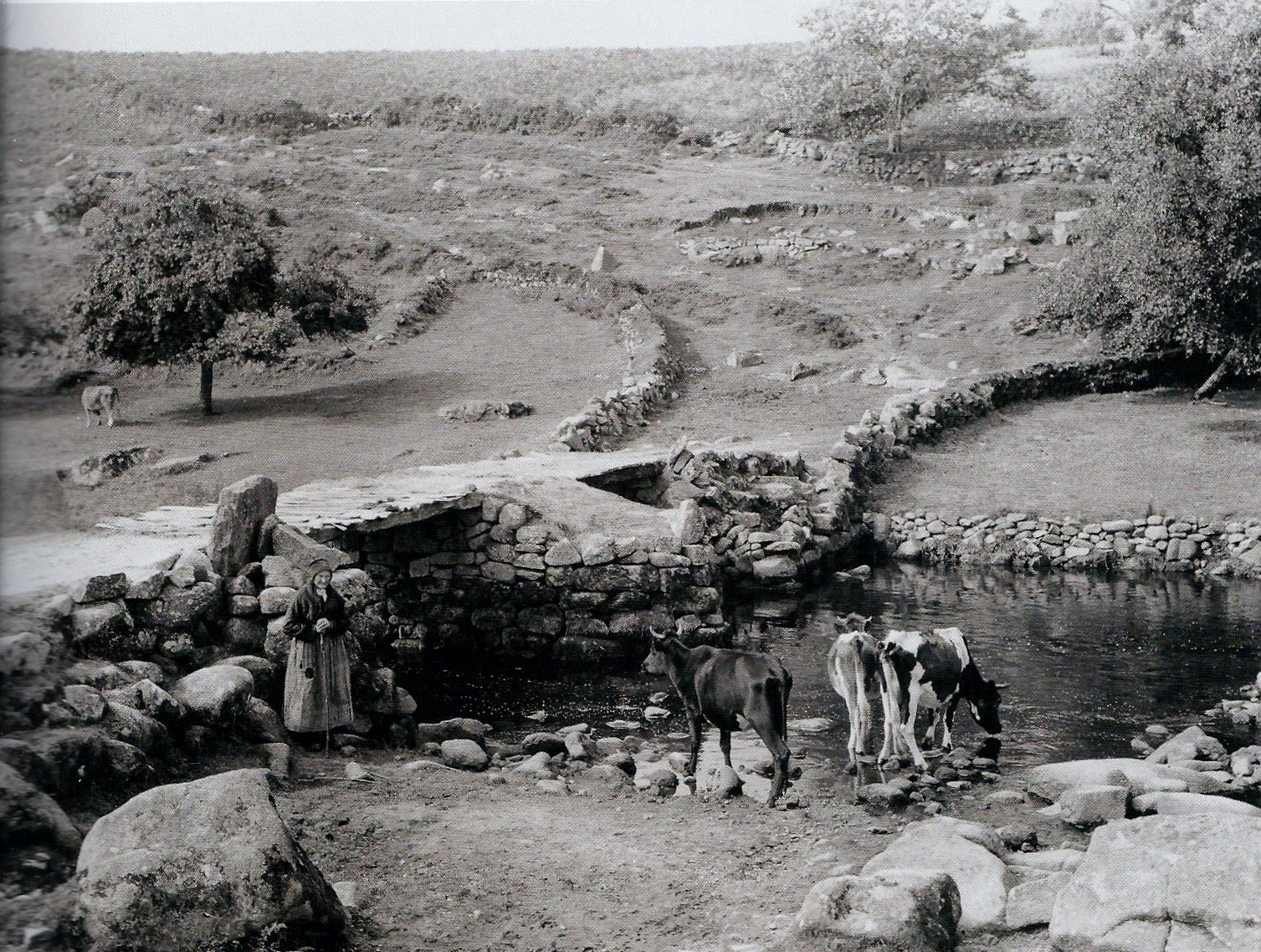 Vallée de l'Ellé vers 1910 (photographie de Philippe Tassier).